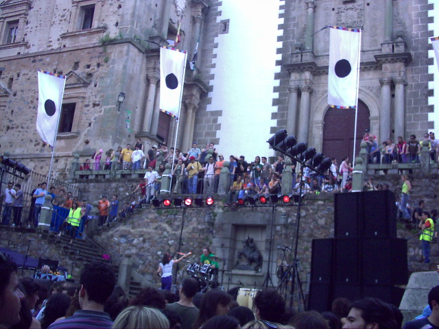 Womad